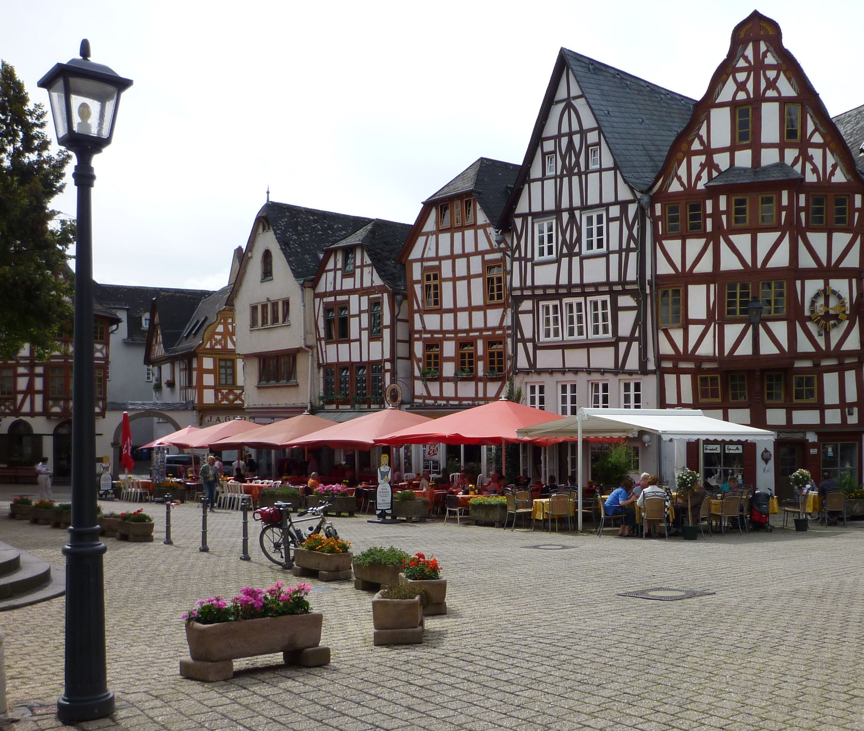 Limburg - Altstadt mit Straßencafes.jpg